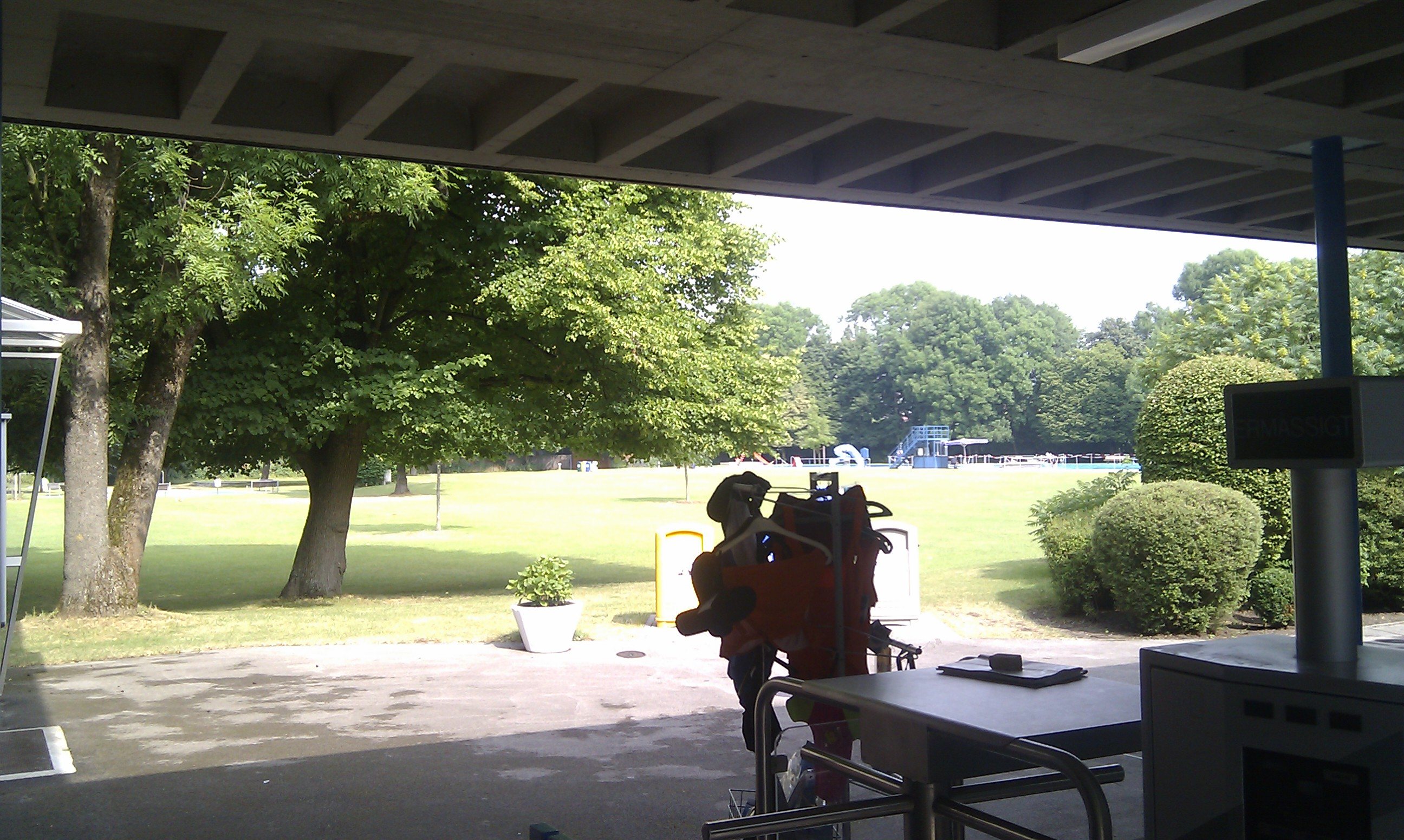 Sommerbad Georgenschwaige, Belgradstraße, München